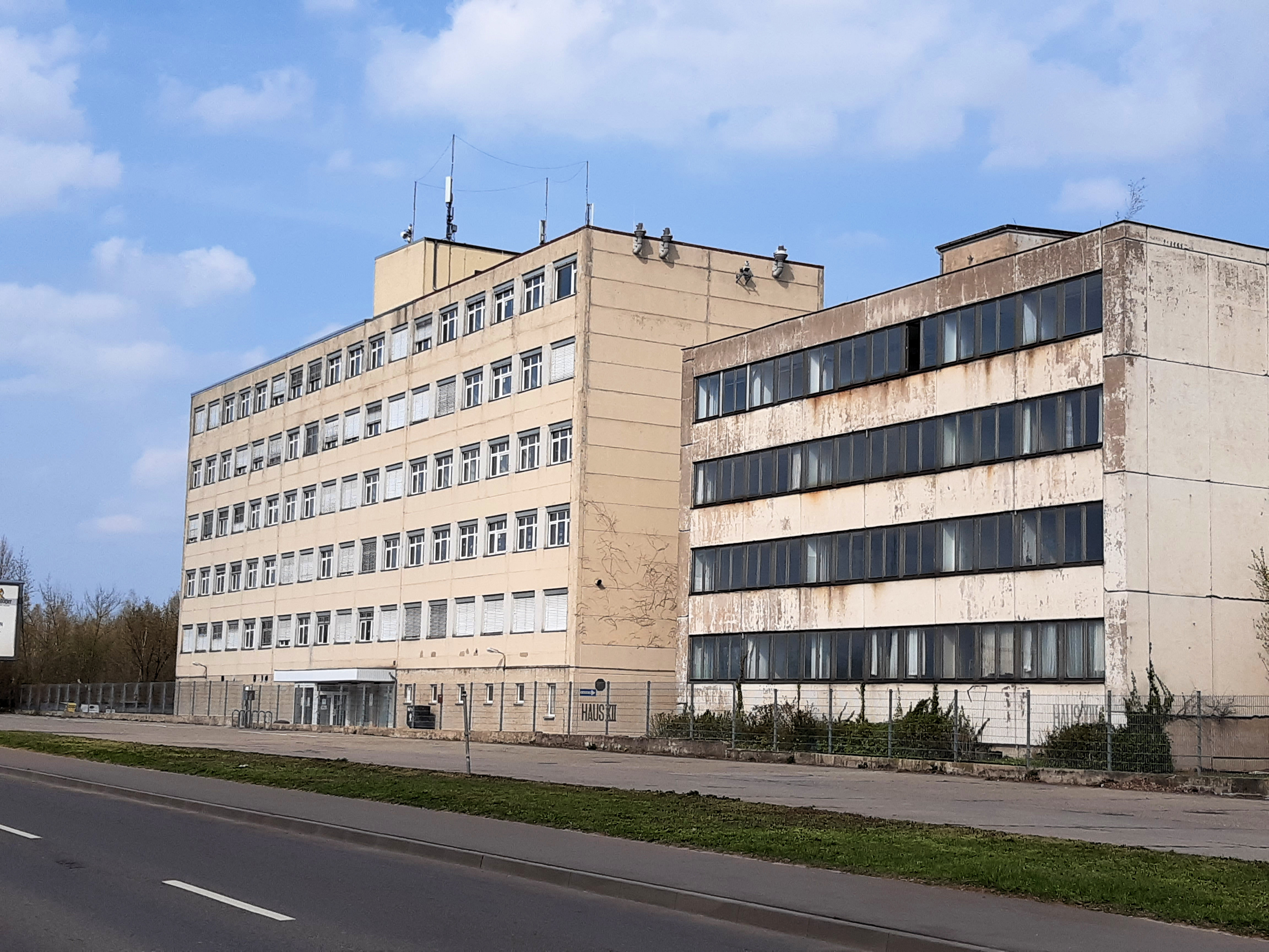 Landesamt für Geologie und Bergwesen, Köthener Straße 38, Halle (Saale), Industriegebiet Nord